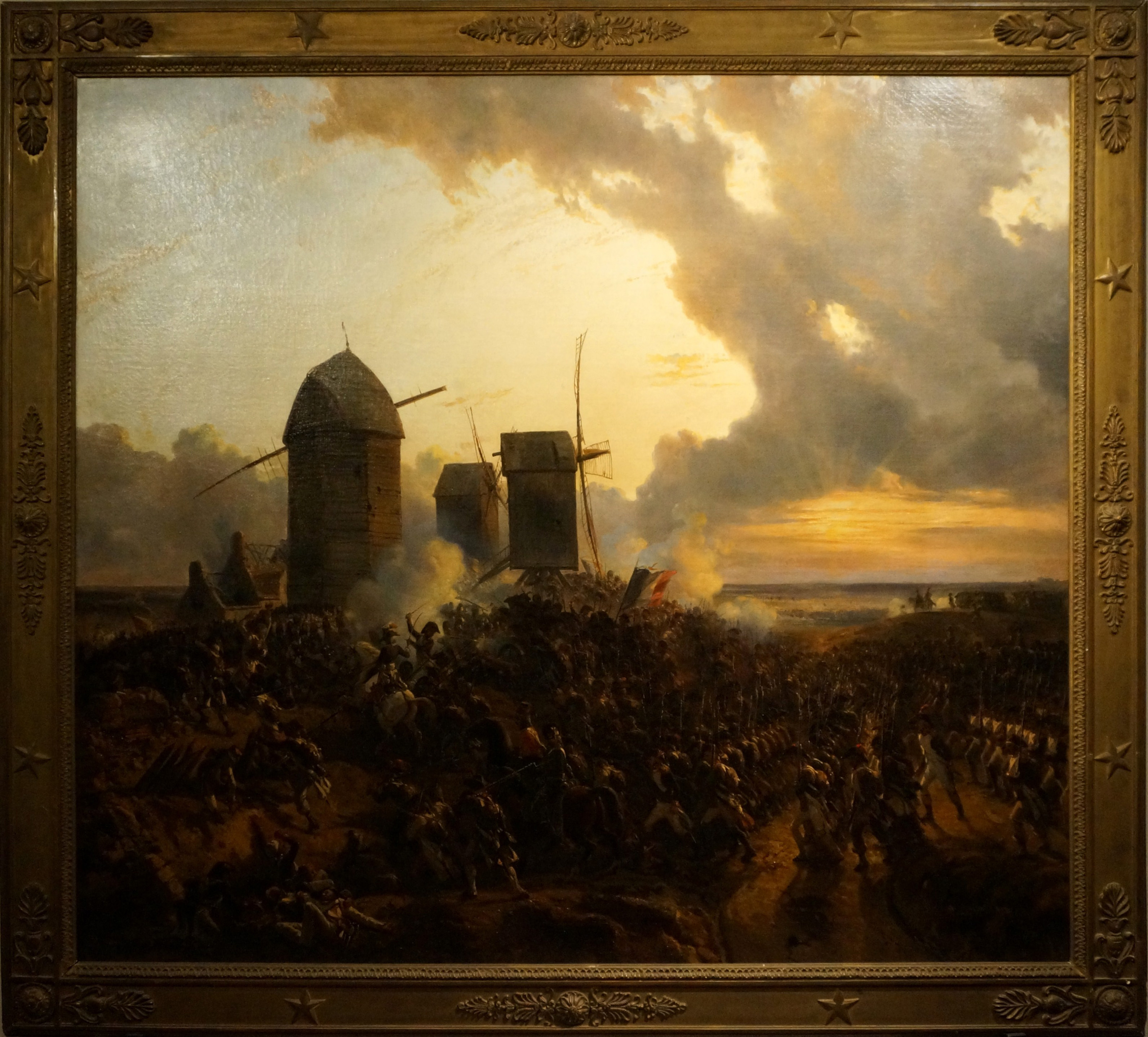 Peinture présentée au musée d el'armée.